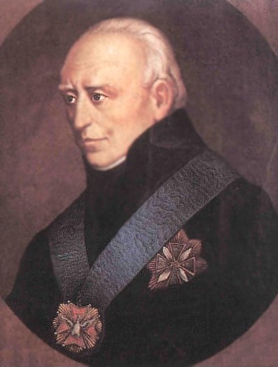 According to the following article [1] as well as the following book ([ Stanisław Staszic: materiały sesji Staszicowskiej : Piła, 19-20 września 1995], p.170) this is a portrait from 1826 by Franciszek Sobolewski